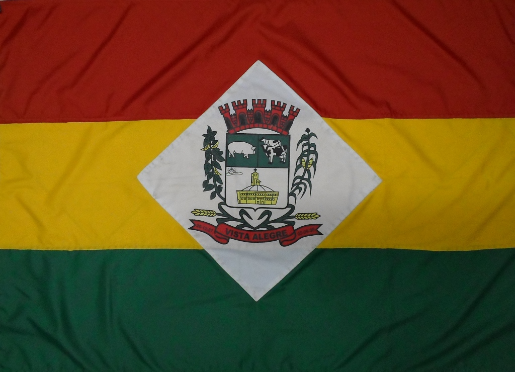 Prefeitura Municipal de Vista Alegre